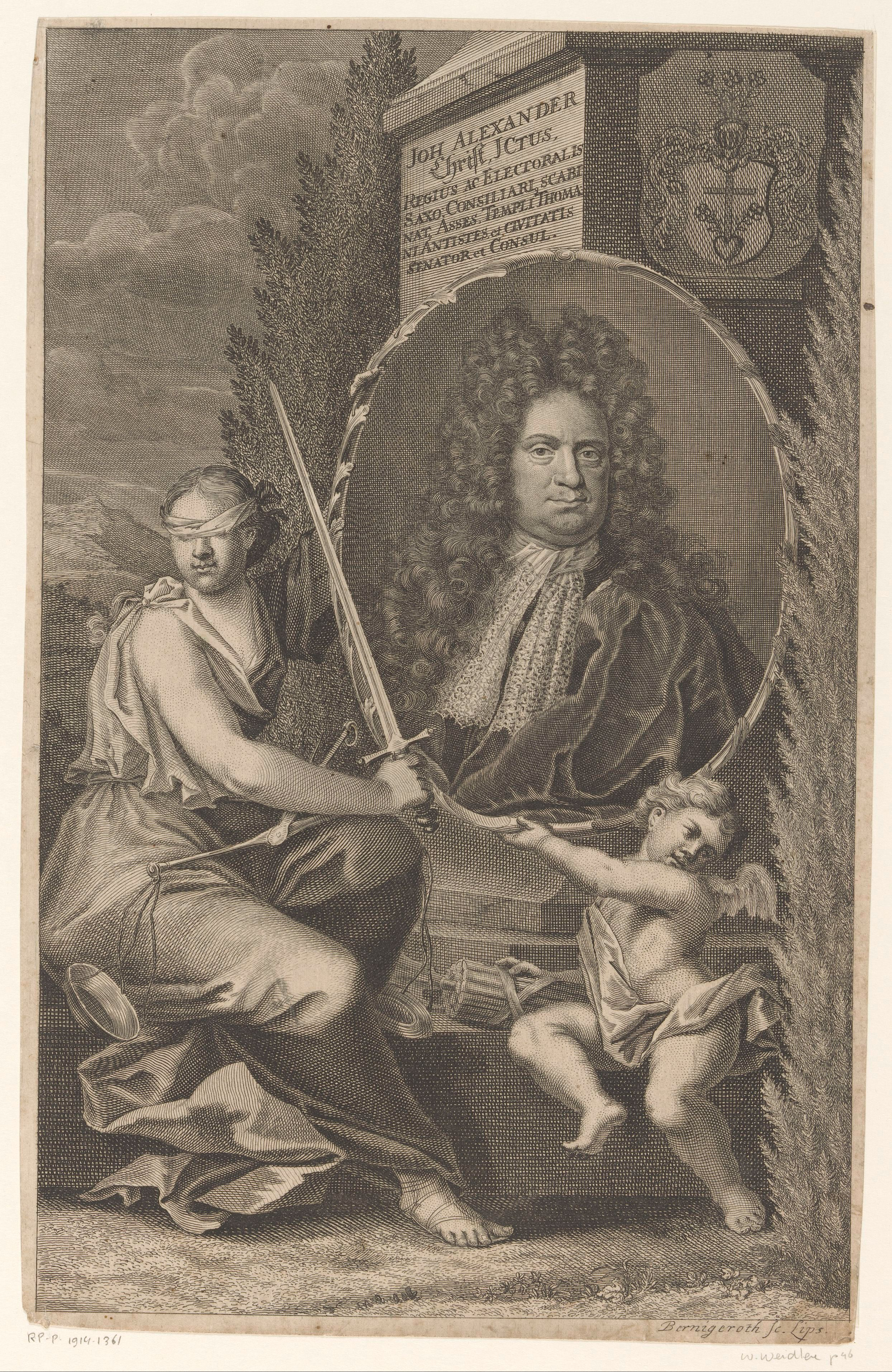 IdentificatieTitel(s): Portret van Johann Alexander ChristObjecttype: prent Objectnummer: RP-P-1914-1361Catalogusreferentie: HAB A 3718Opschriften / Merken: verzamelaarsmerk, verso, gestempeld: Lugt 2228VervaardigingVervaardiger: prentmaker: Martin Bernigeroth (vermeld op object)Plaats vervaardiging: LeipzigDatering: 1707 - 1733Fysieke kenmerken: ets en gravureMateriaal: papier Techniek: etsen / graveren (drukprocedé)Afmetingen: blad: h 290 mm (binnen de plaatrand afgesneden) × b 186 mm (binnen de plaatrand afgesneden)OnderwerpWat: historical personsarmorial bearing, heraldryJustitia (justice) as Roman personificationcupids: 'amores', 'amoretti', 'putti'Wie: Johann Alexander Christ (I)Verwerving en rechtenVerwerving: aankoop 1905Copyright: Publiek domein